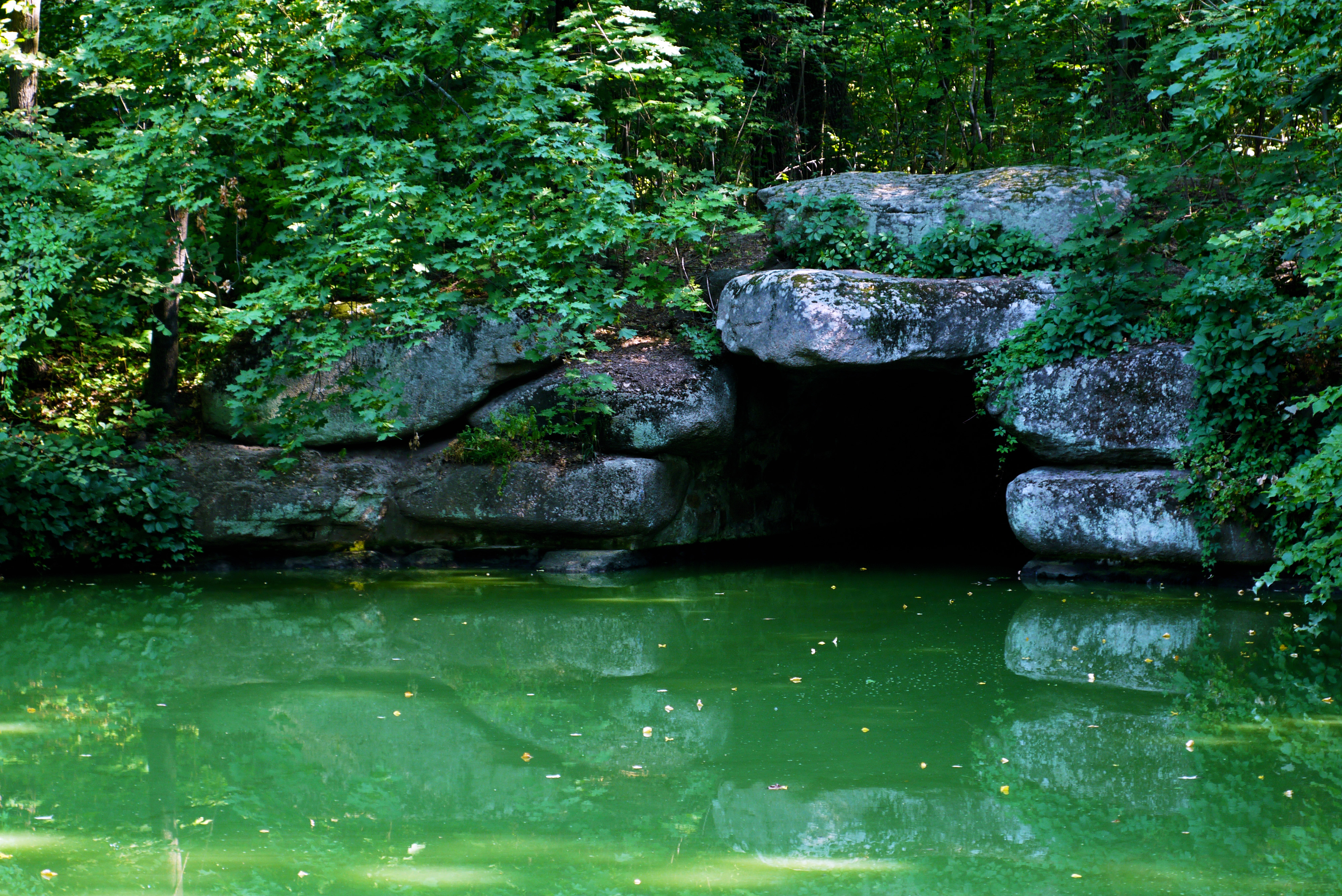 5.19. Підземна ріка Стікс (Річка підземна Ахеронт (р. Стікс)), Умань, вул. Садова, 55 (парк «Софіївка»)